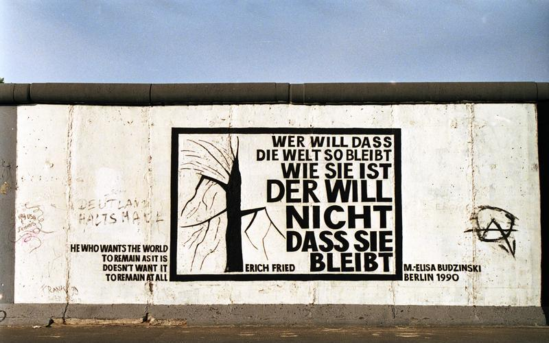 25.7.1991 "East-Side-Gallery", gelegen zwischen der Jannowitzbrücke und der Oberbaumbrücke. Reste der Berliner Mauer, die nach der Öffnung von vorwiegend ostdeutschen Künstlern auf der Ost-Seite bemalt wurden.